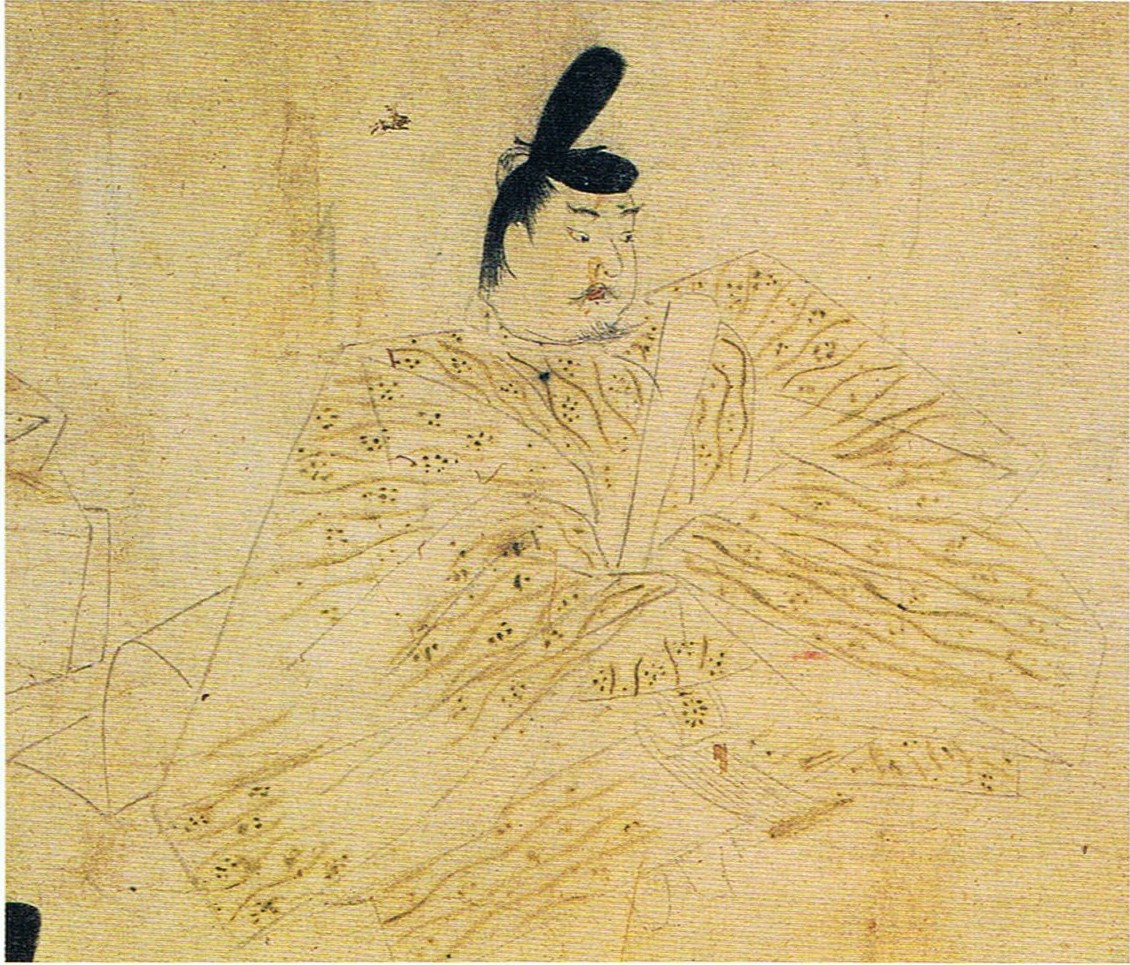 藤原頼長像